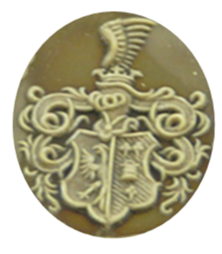 familiewapen